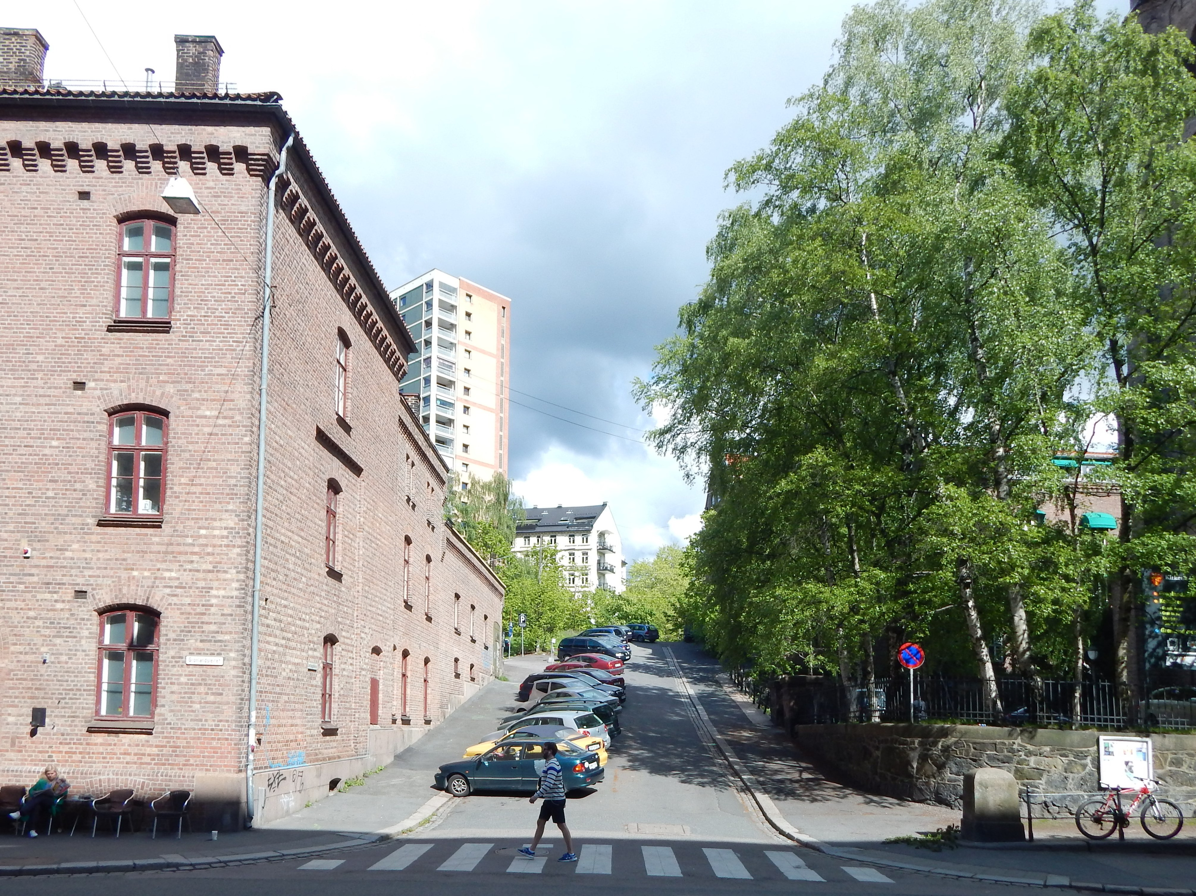 Enerhaugkleiva på Grønland i Oslo